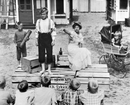 Kuvassa näytelmäsovitus Pikku Pietarin Pihasta. Dramatisoinnin pääroolissa oli Juhan af Grann, joka näytteli Pikku Pietaria.